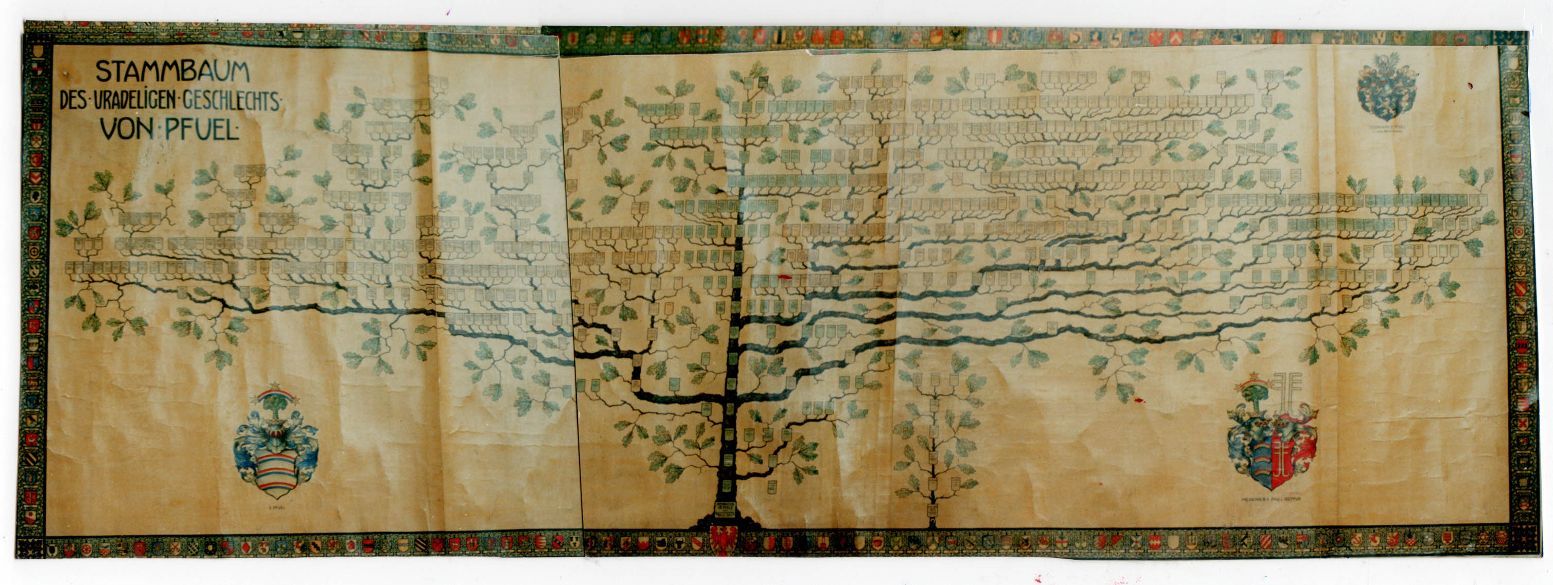 Stammbaum derer von Pfuel